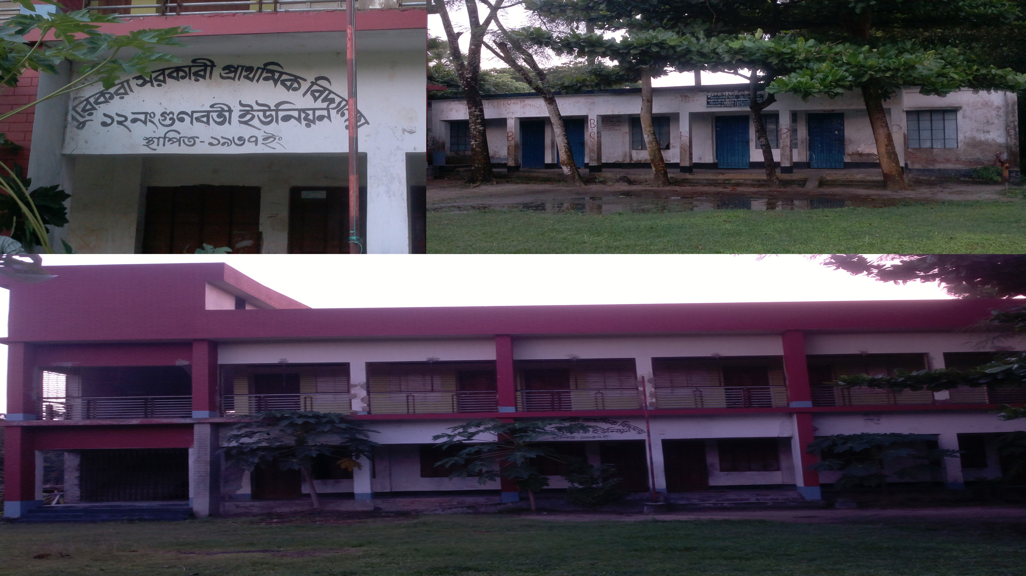 সুরিকরা প্রাথমিক বিদ্যালয়